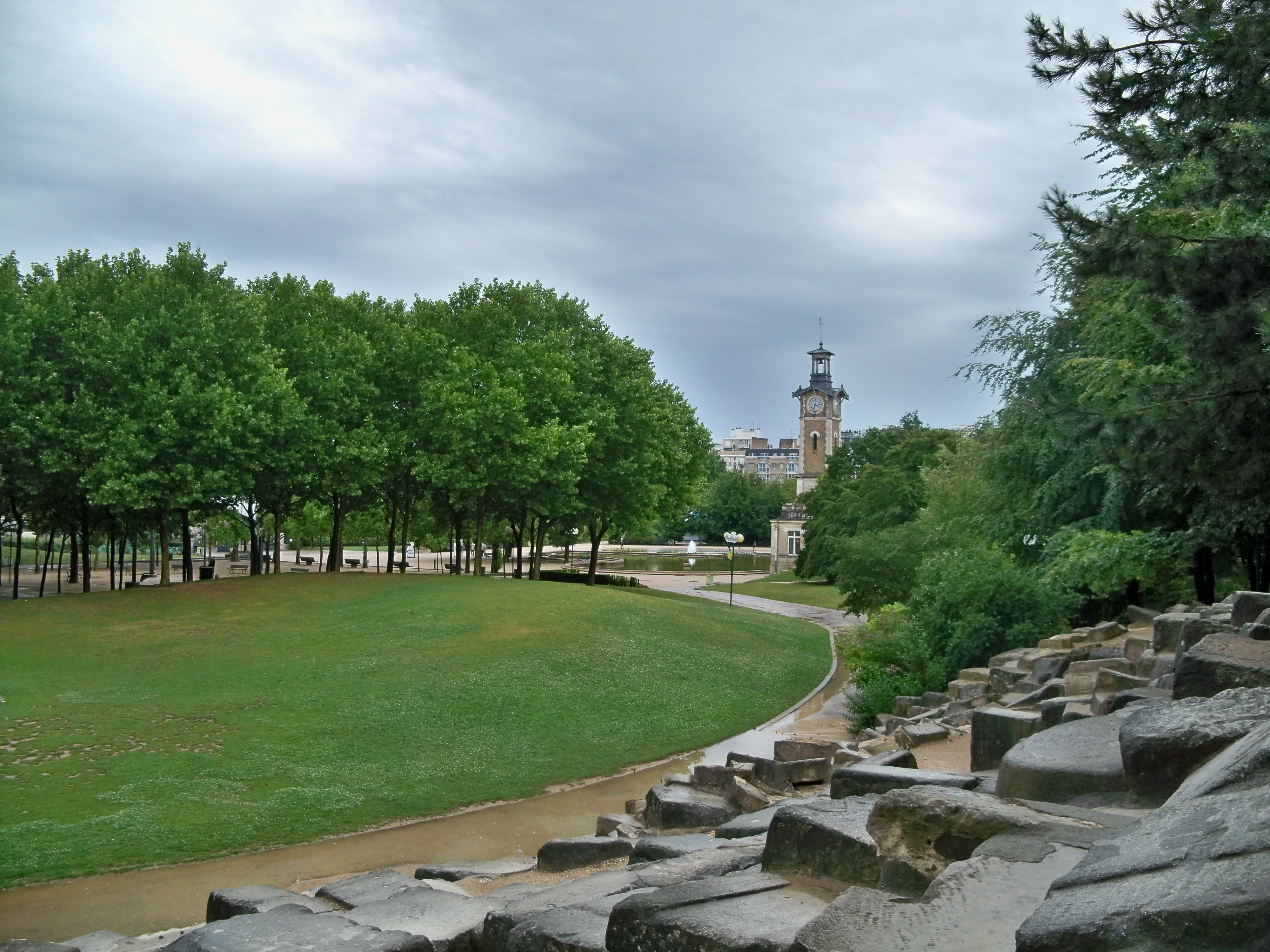 Parc Georges Brassens, vue générale